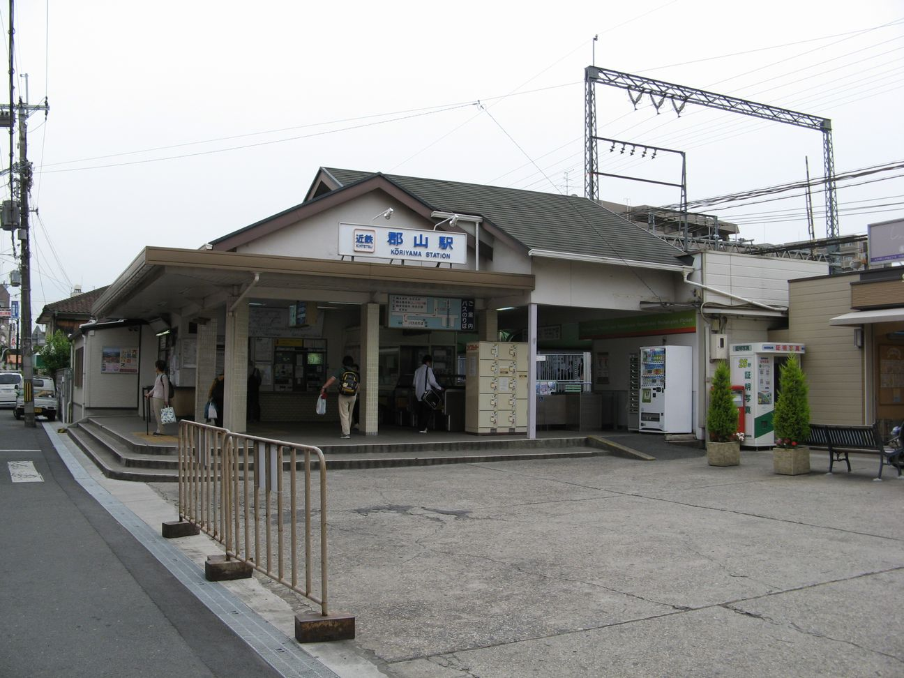 近鉄郡山駅 2007年5月18日 Bakkai撮影 Category:近畿日本鉄道の画像 Category:鉄道駅画像 Category:大和郡山市の画像